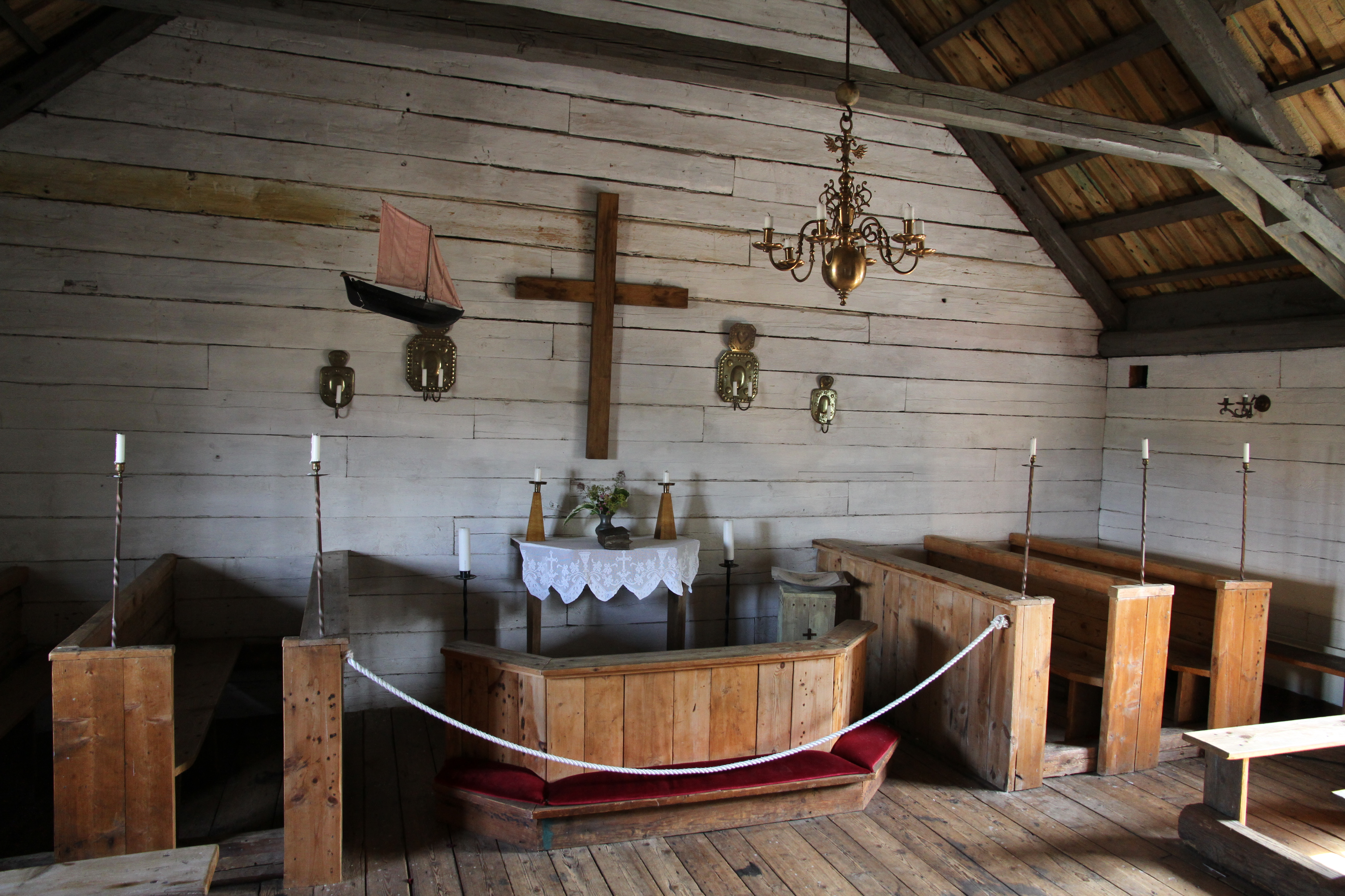 Karlshamns Kastell 26 juli 2013